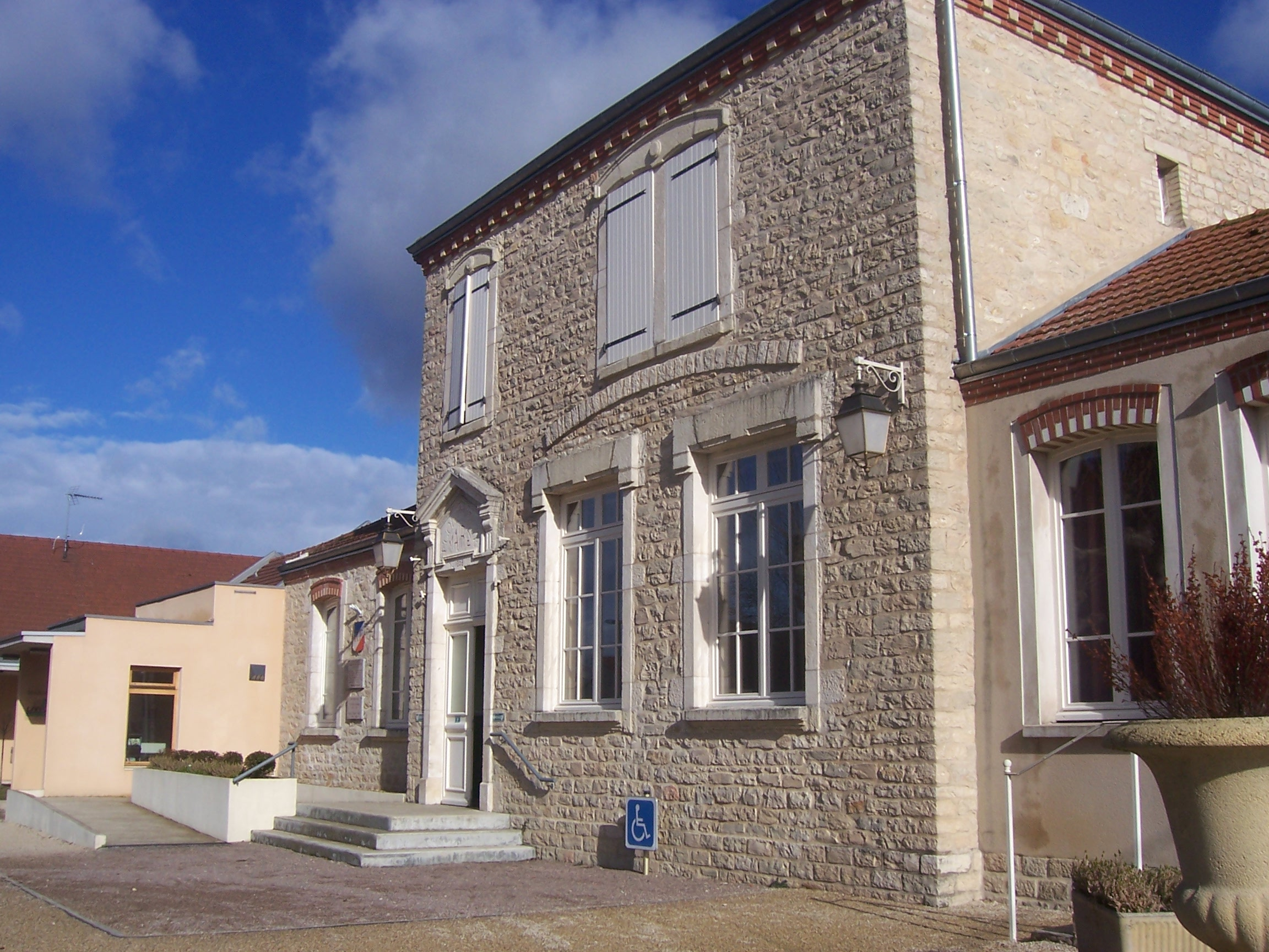 Lans Mairie